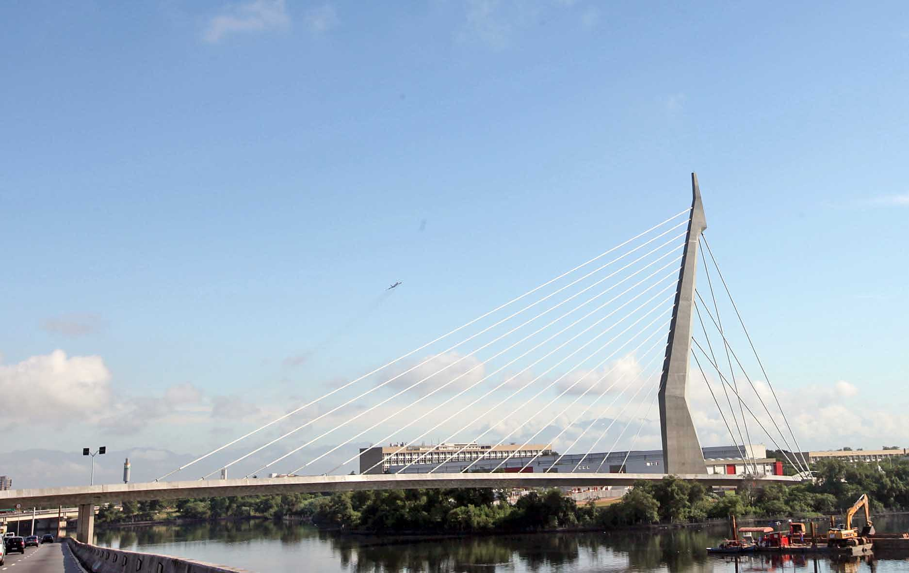 Foto na inauguração da Ponte do Saber, primeira ponte estaiada do Rio de Janeiro.